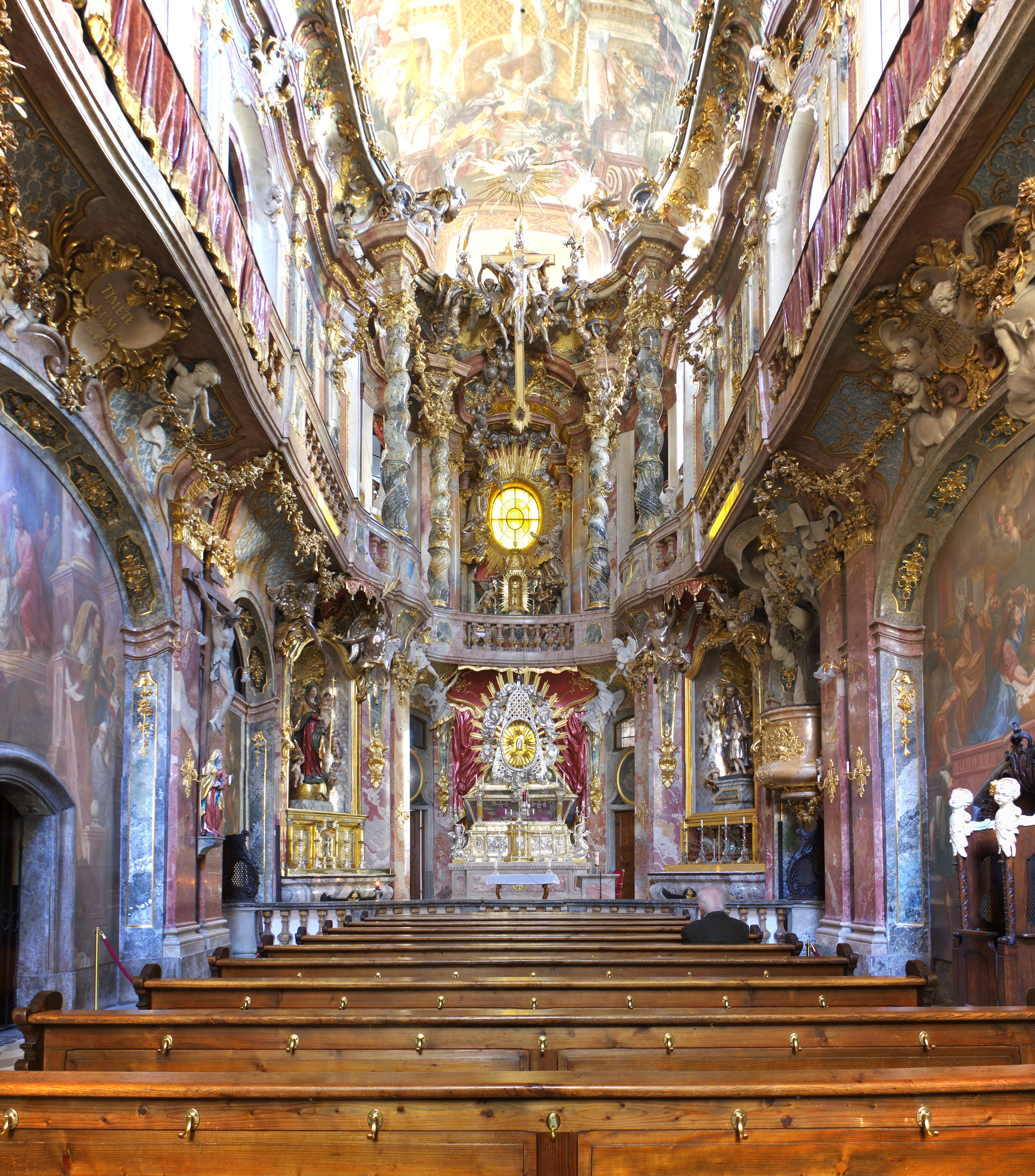 München, Sendlinger Straße 32, Kath. Kirche St. Johannes von Nepomuk, Akten-Nr. D-1-62-000-6492